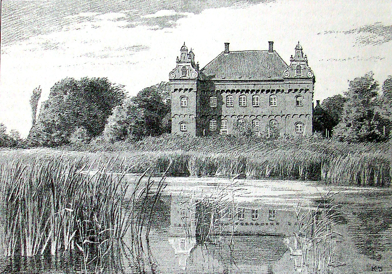 Nakkebølle er en gammel herregård i Faaborg-Midtfyn Kommune, Denmark